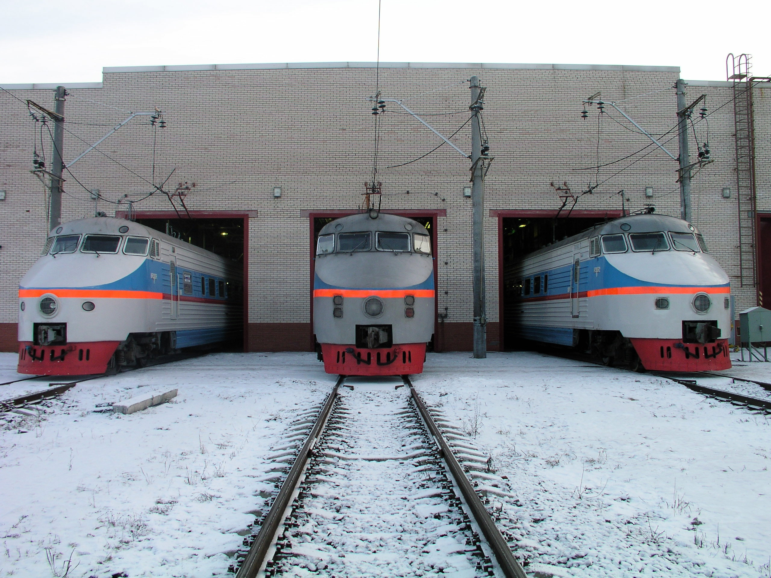 Все электропоезда ЭР-200 в депо